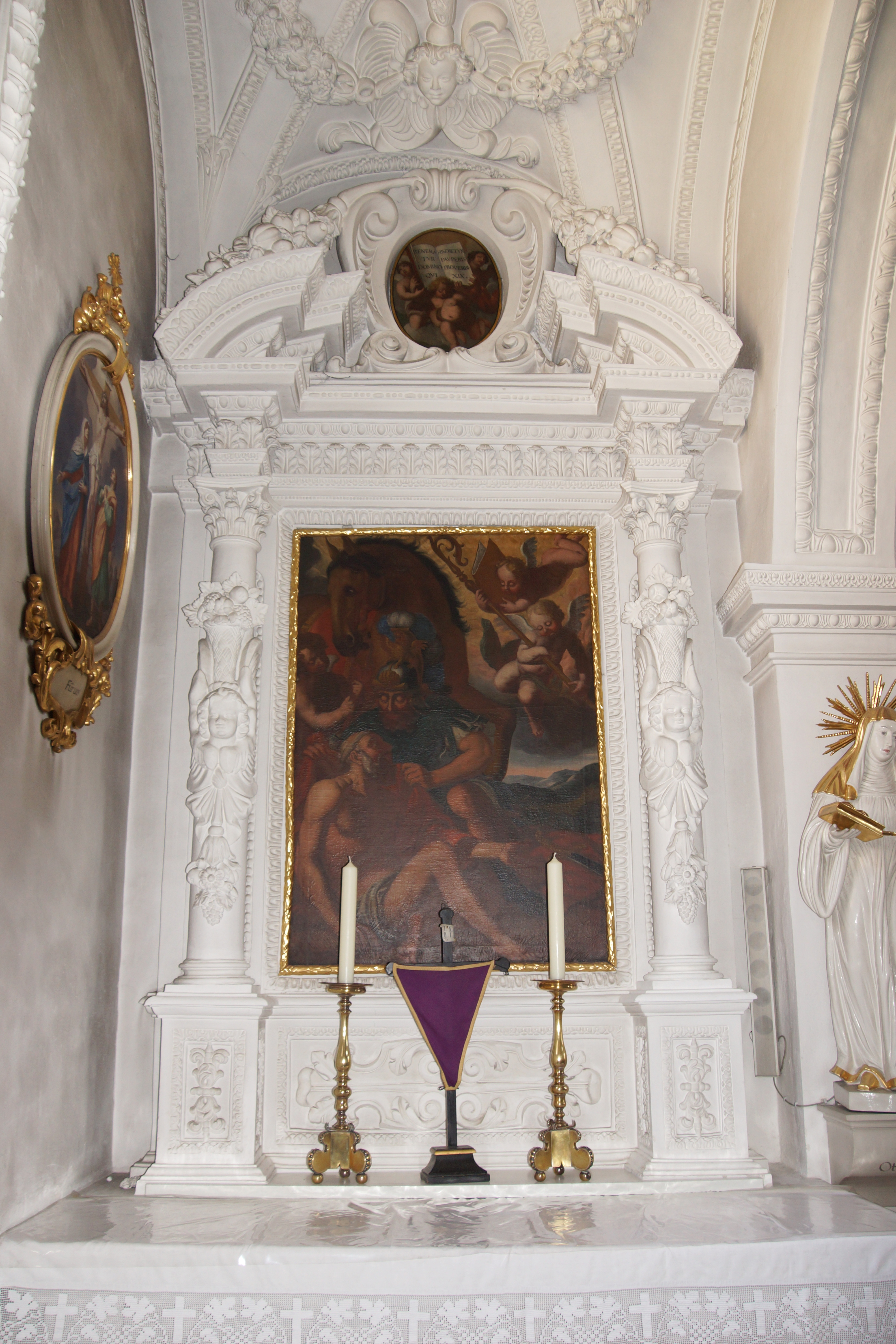 Die katholische Pfarrkirche Mariä Himmelfahrt in Pfreimd